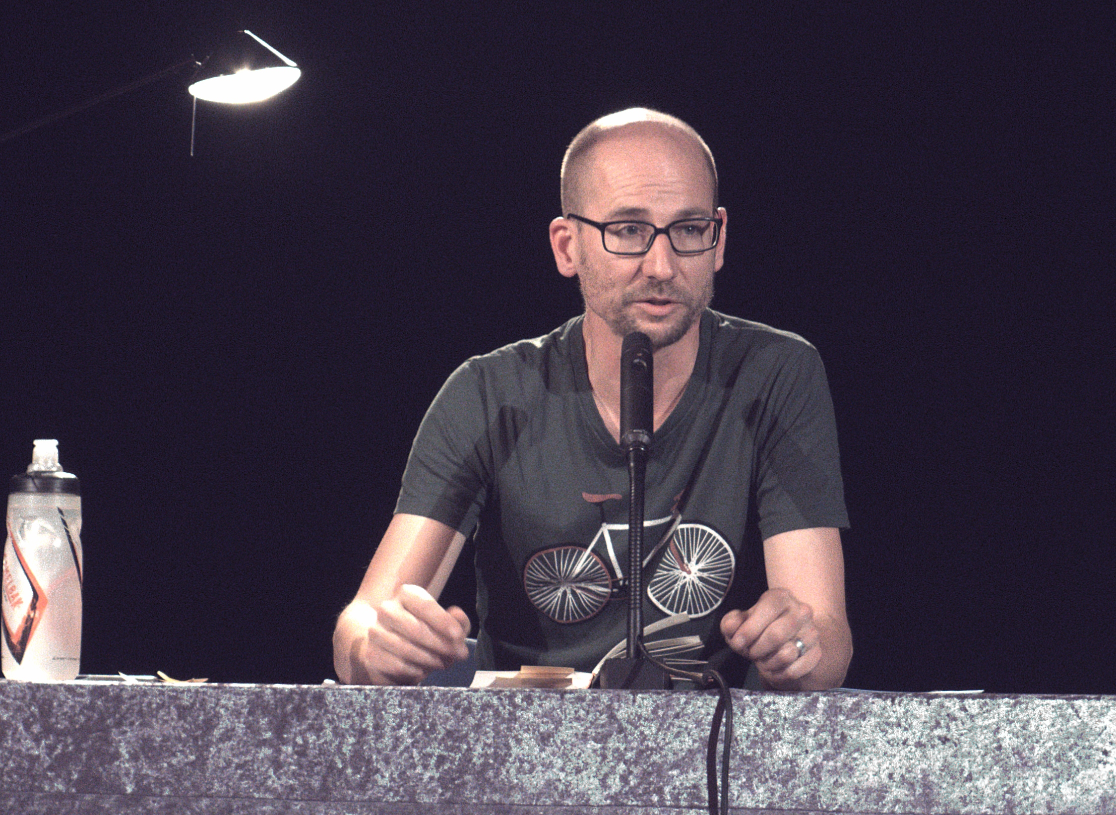 Sebastian Herrmann bei der Lesenacht 2017 in Unterhaching.